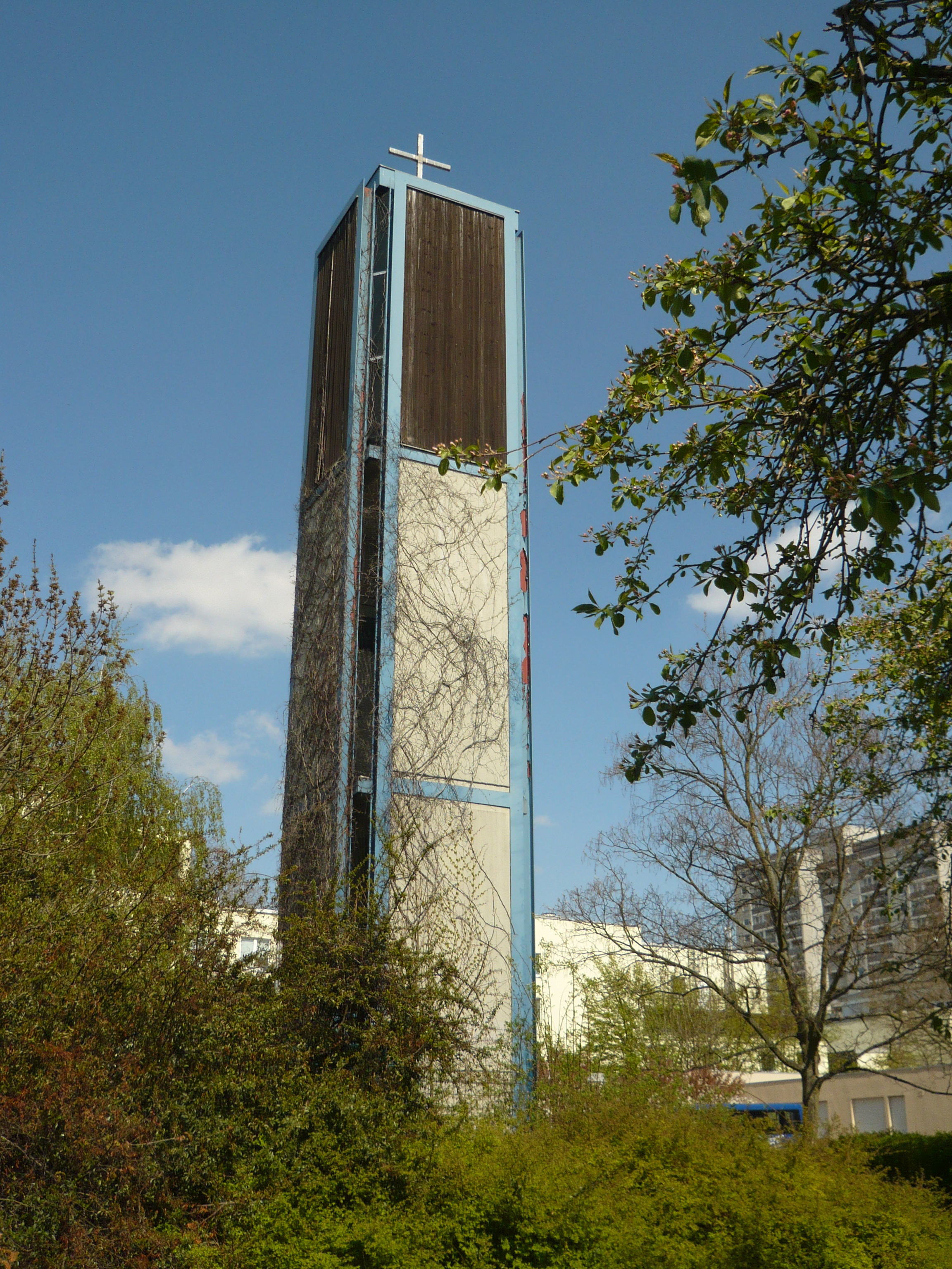 Berlin-Gropiusstadt, Martin-Luther-King-Gemeinde